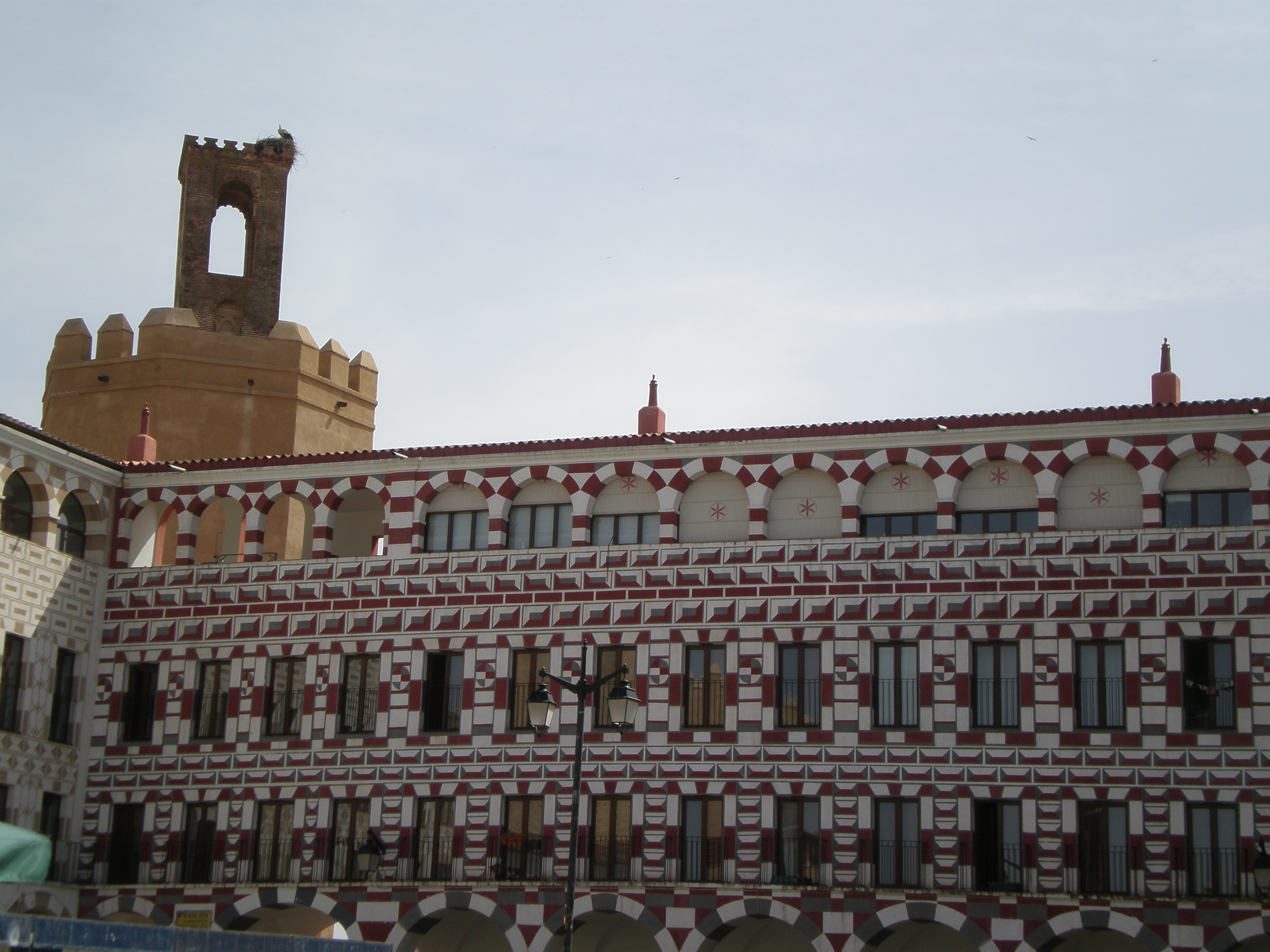 Plaza Alta, Badajoz, Extremadura, Spain